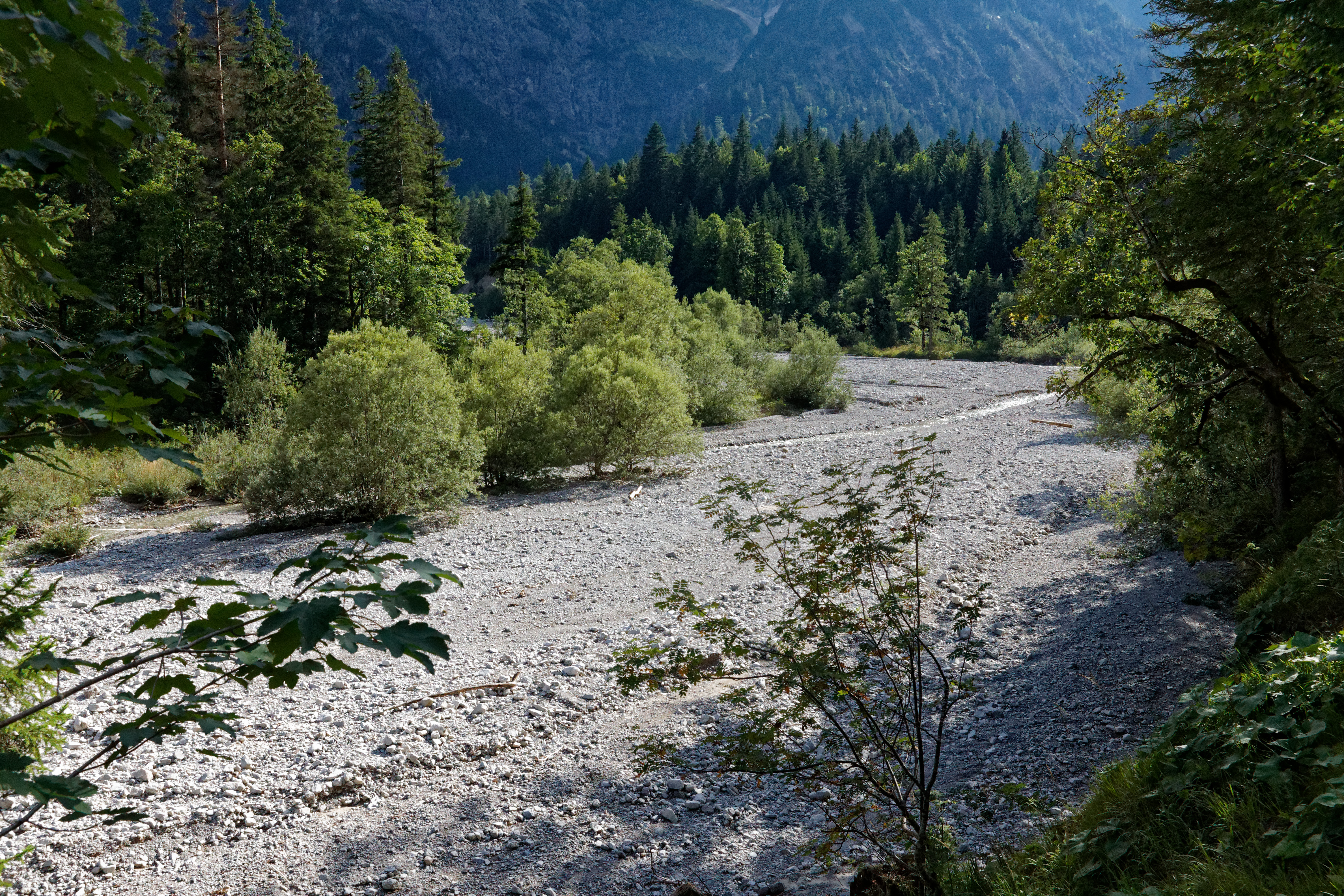 Oberlauf der Linder bei den Sieben Quellen